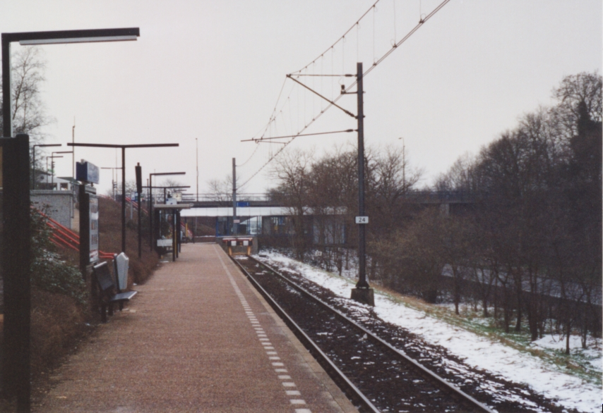 Station Rhenen (2005)